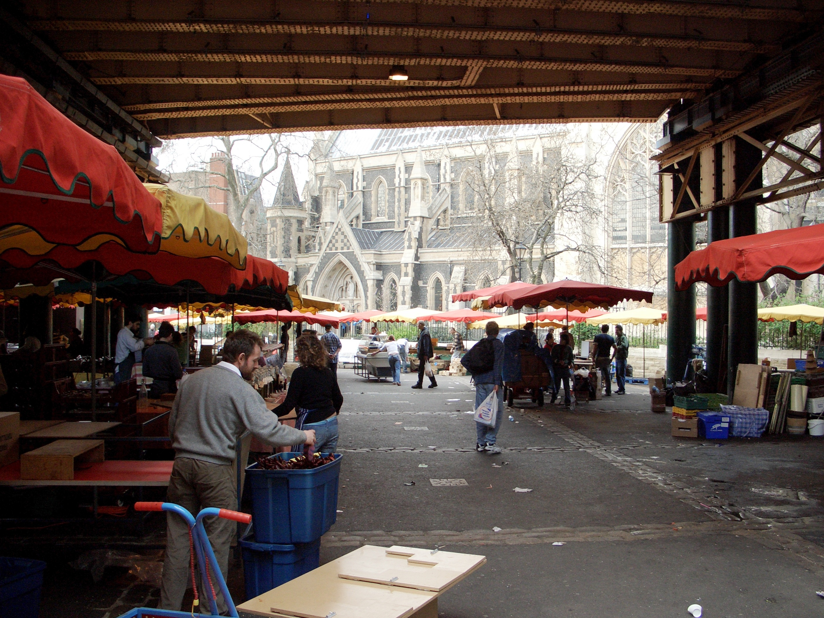 Londres - Mercat de Borough